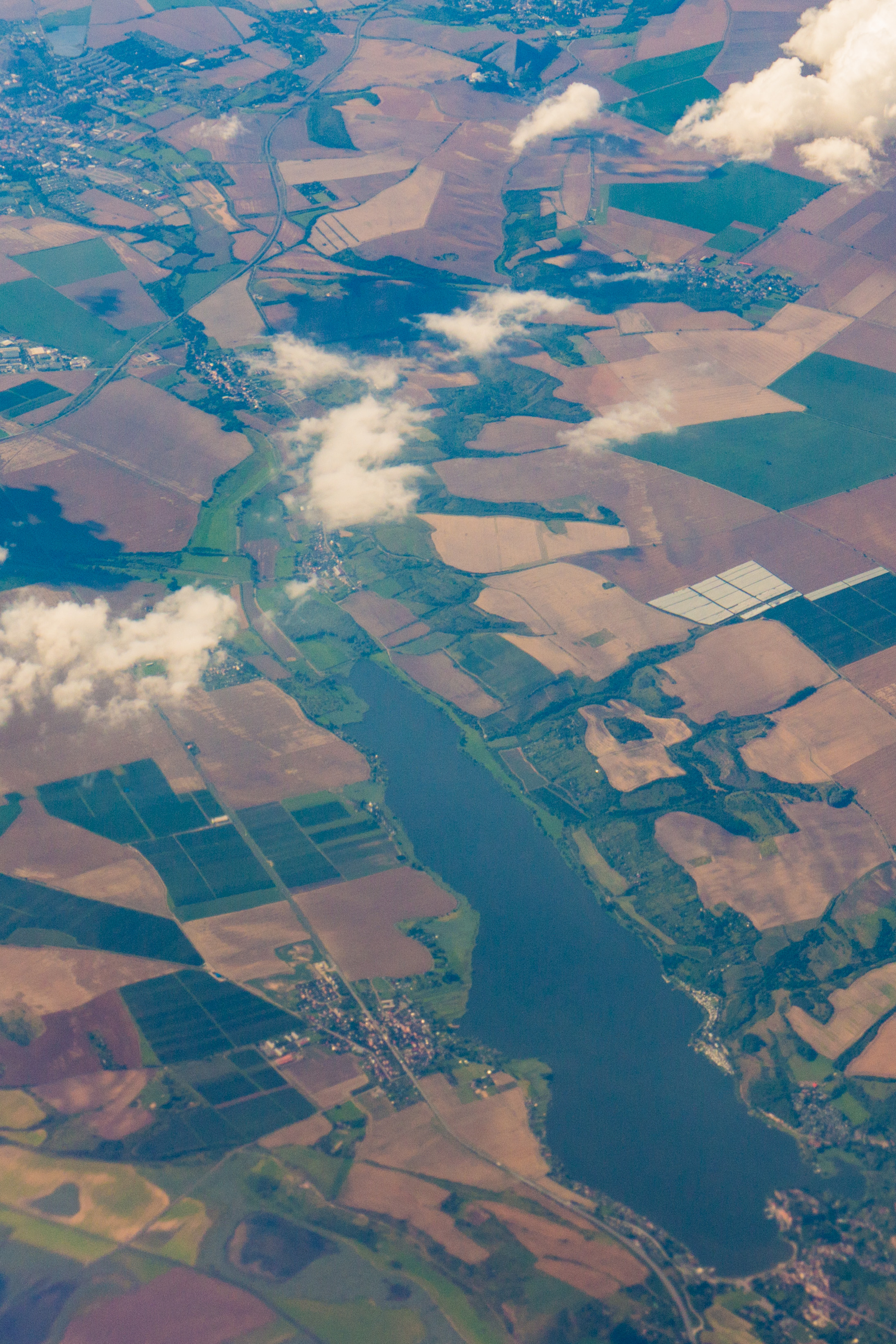 Süßer See